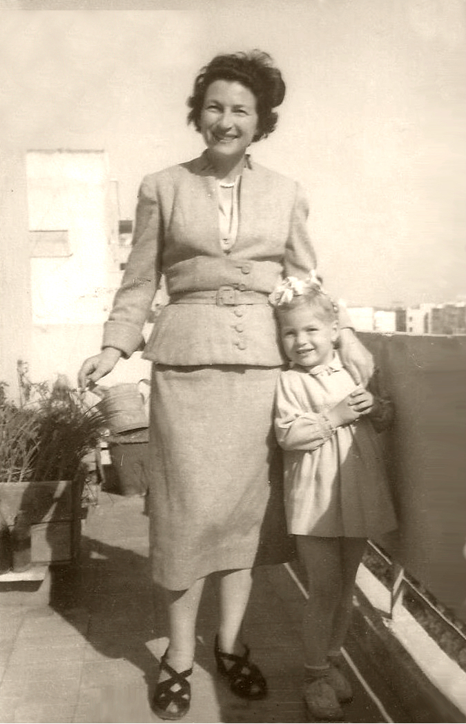 רחל מרקובסקי עם בתה תמר